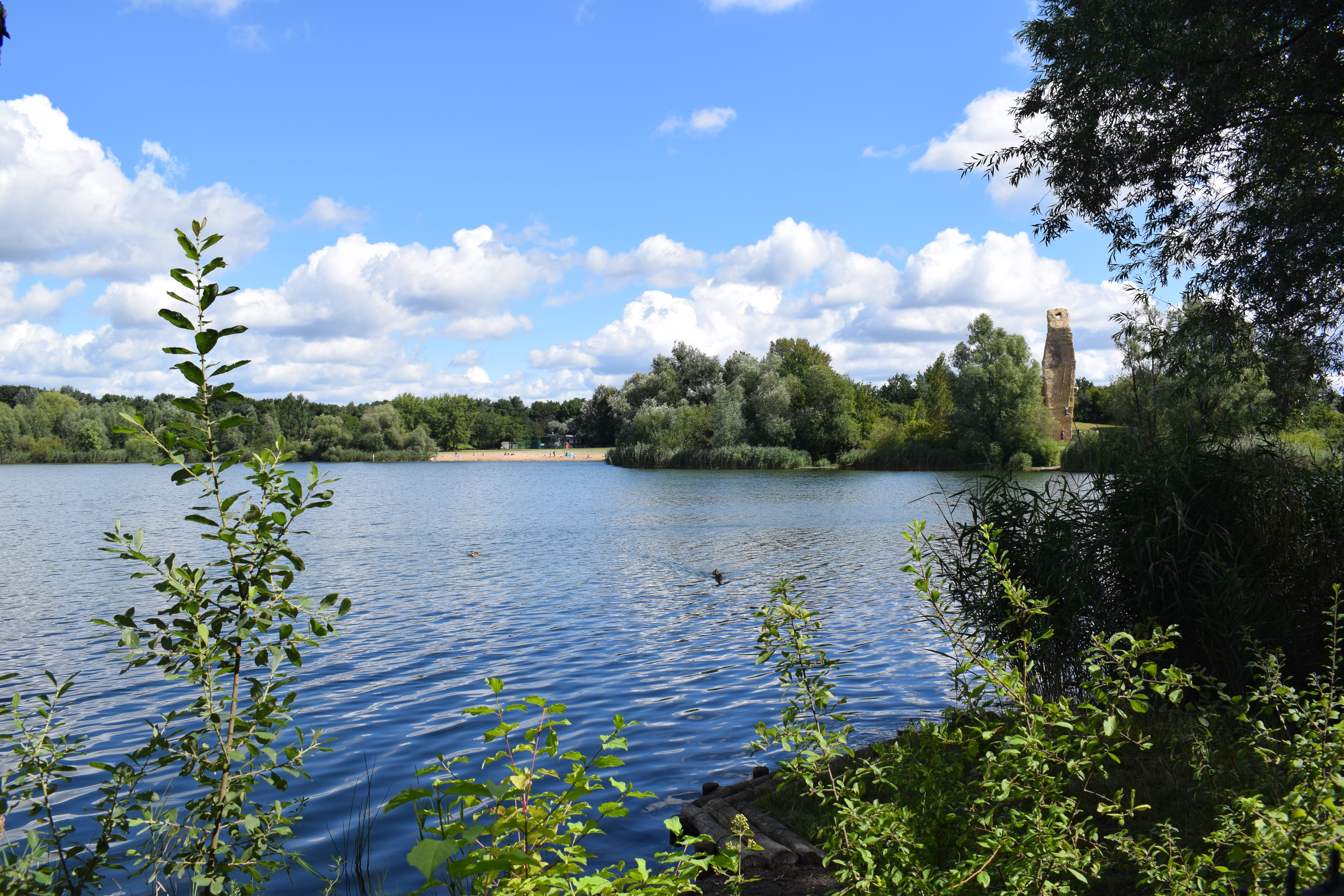 Blick über den Spektesee auf die neu gestaltete Badestelle.